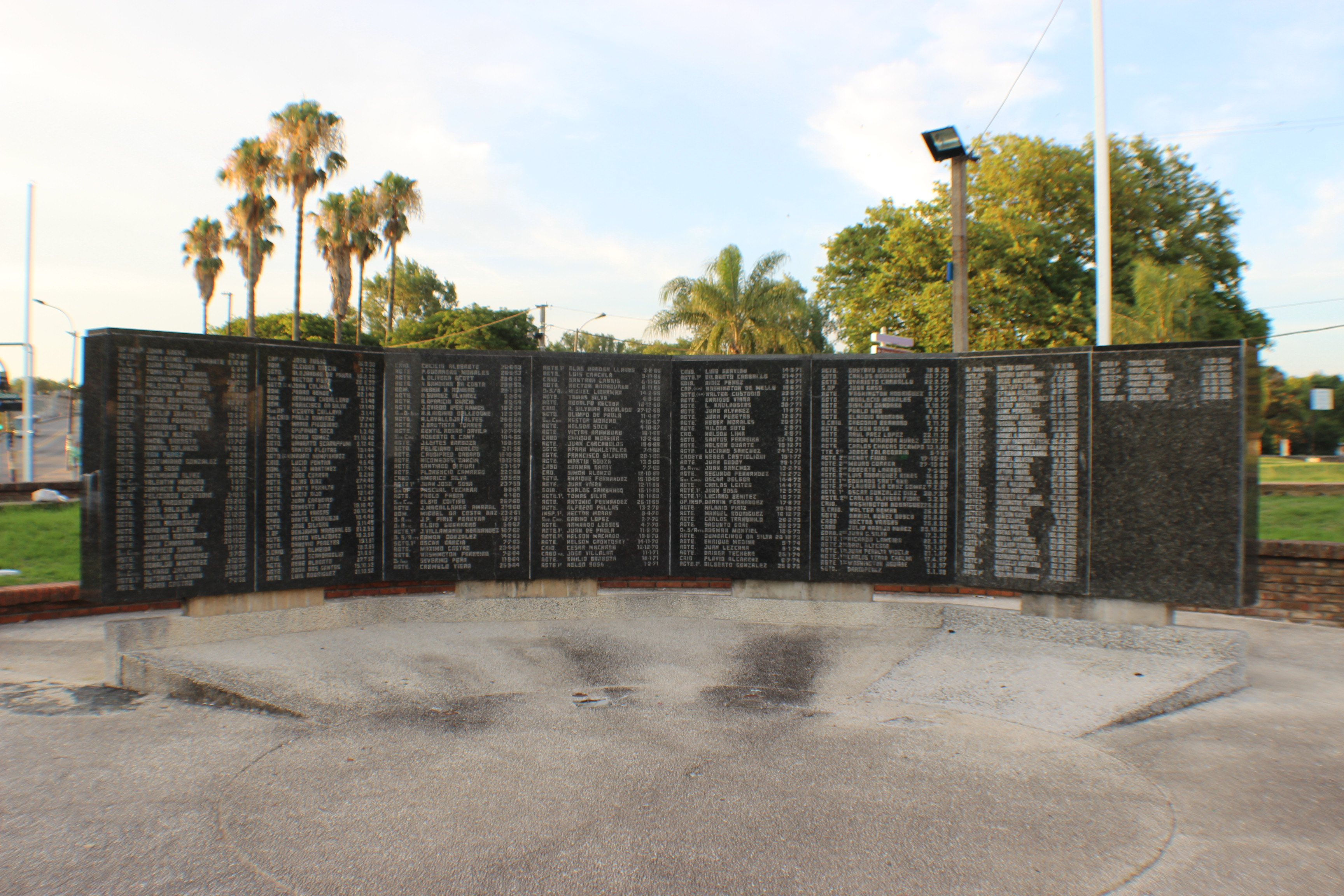 Plaza de la Policia Nacional 2017